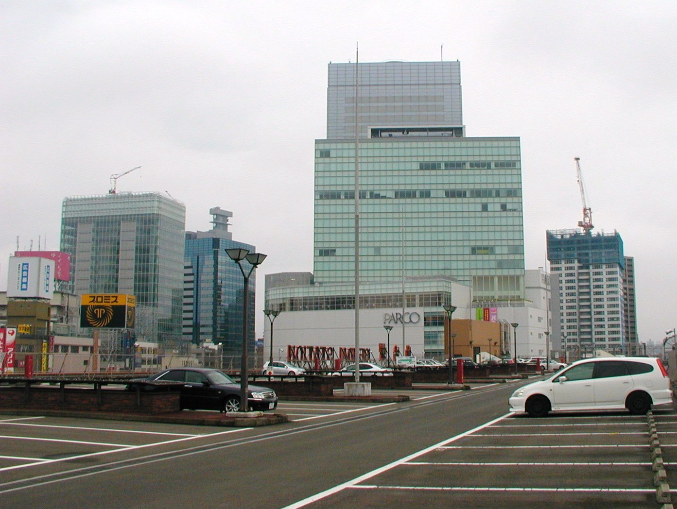 日曜日早朝のJR仙台駅屋上駐車場